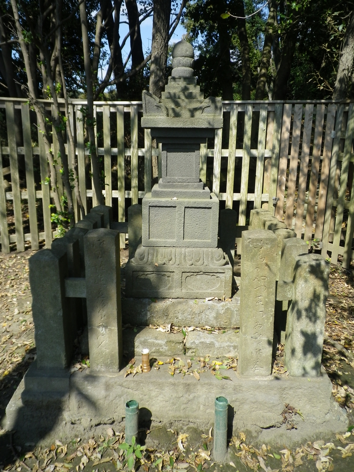 冷泉為相の墓